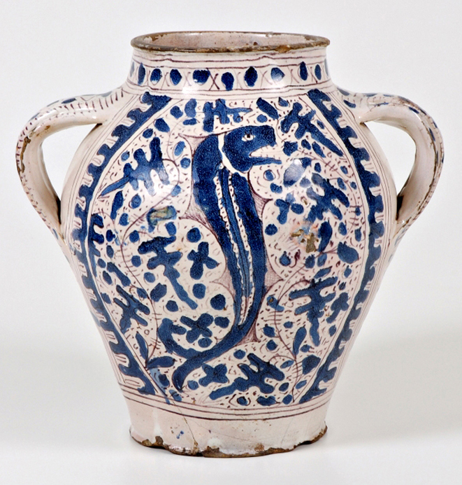 Vaso decorato a zaffera a rilievo. Giunta di Tugio. Area fiorentina, prima metà del XV secolo